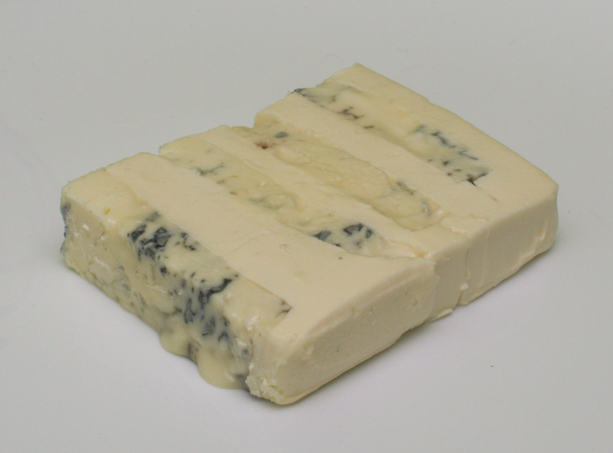 Fromage italien composé de mascarpone et de gorgonzola. Également appelé gormas.